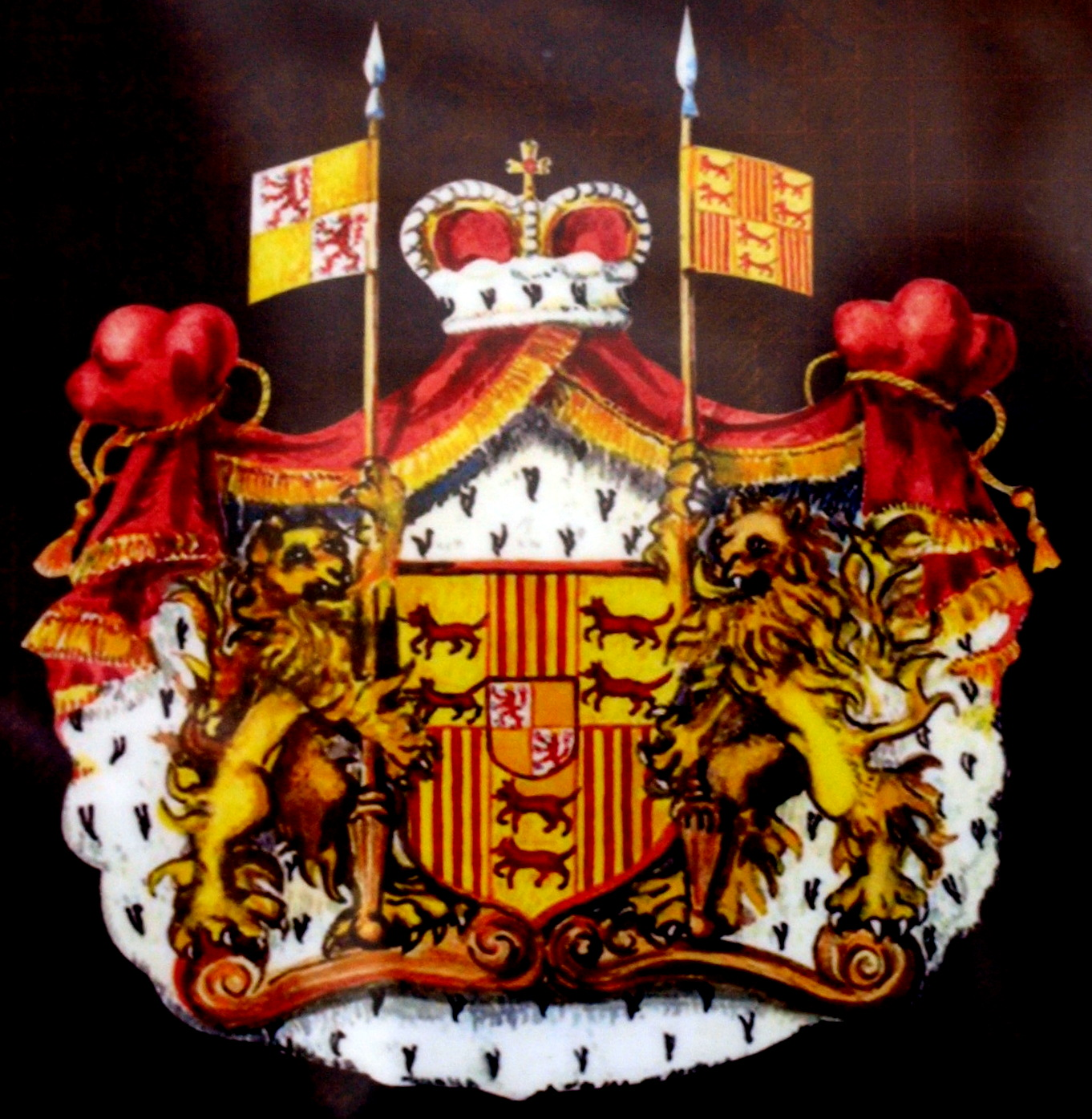 Erb rodu Silva-Tarouca v Průhonicích